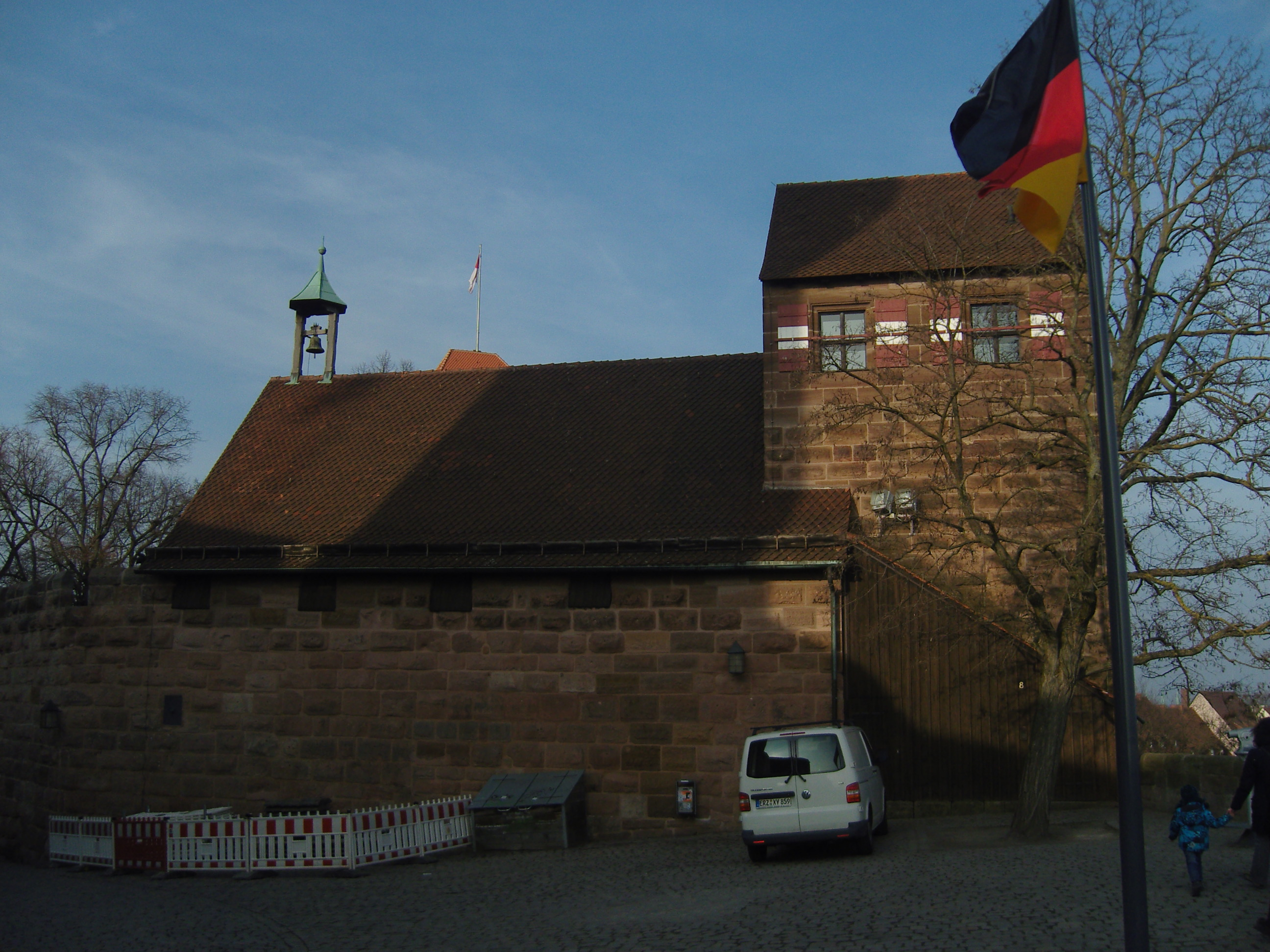 Walpurgiskapelle auf der Burg Nürnberg